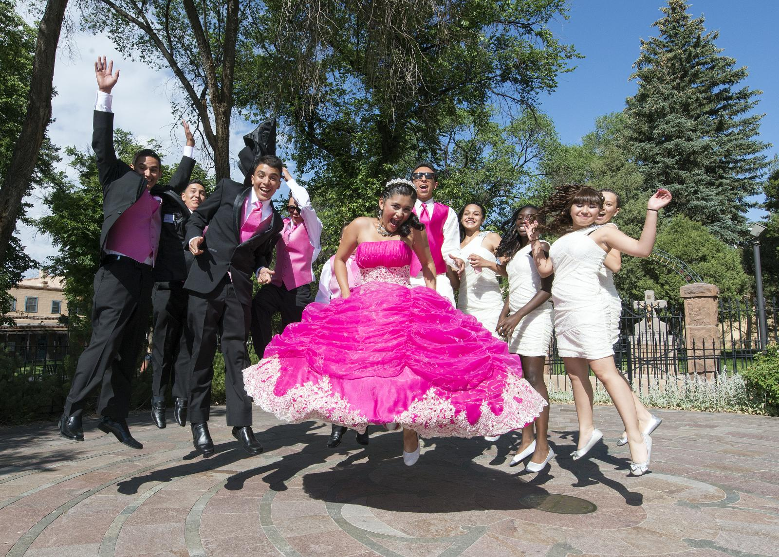 Quinceañera. Santa Fe